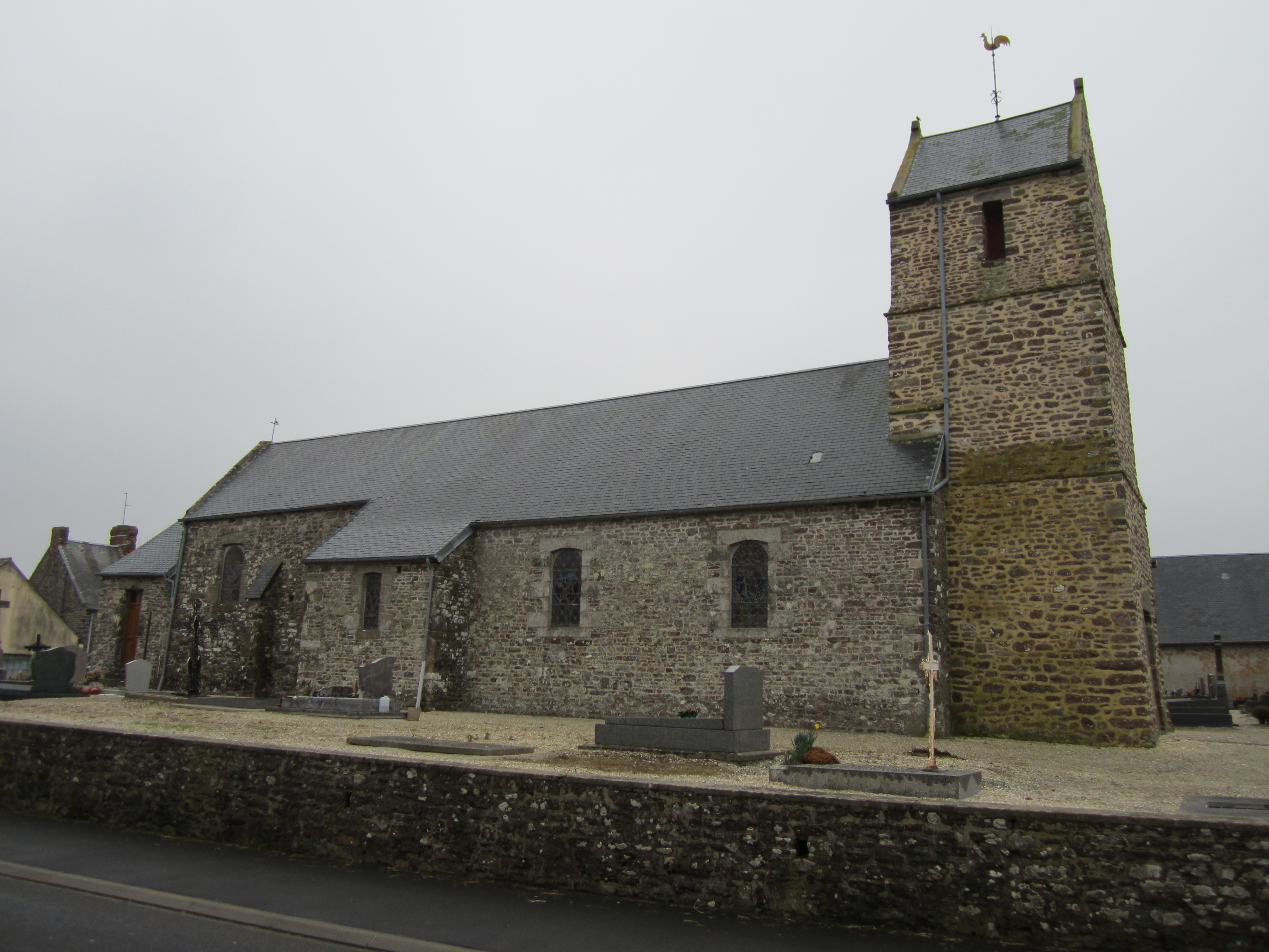 Église Notre-Dame du Lorreur